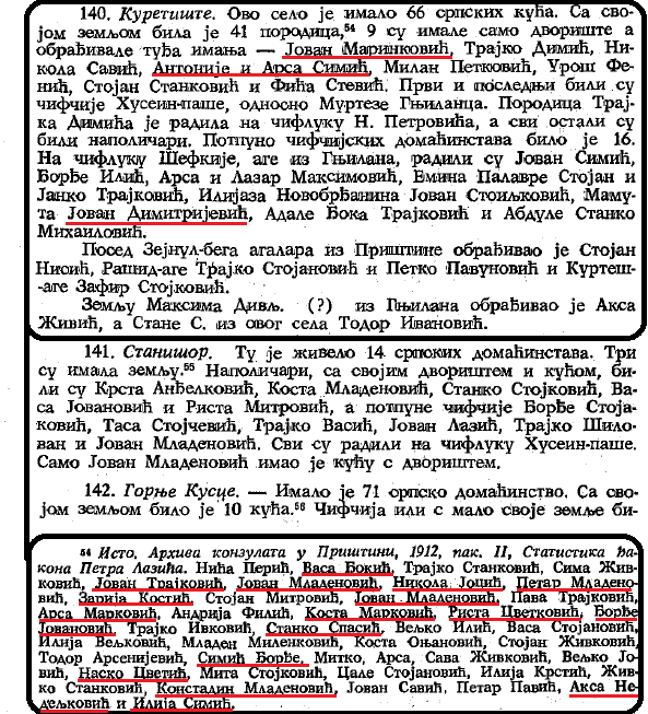 На овој слици можемо видети станицу из књиге Ђорђа Микића, на којој он поименице пребројава ко је 1912. године у селу Коретишту био власник имања, ко је био чивчија, а ко је био получивчија. На слици можемо видети да више од половине оних који имају своја дворишта и имања припада роду Пејнаца. Управо су они и подвучени.